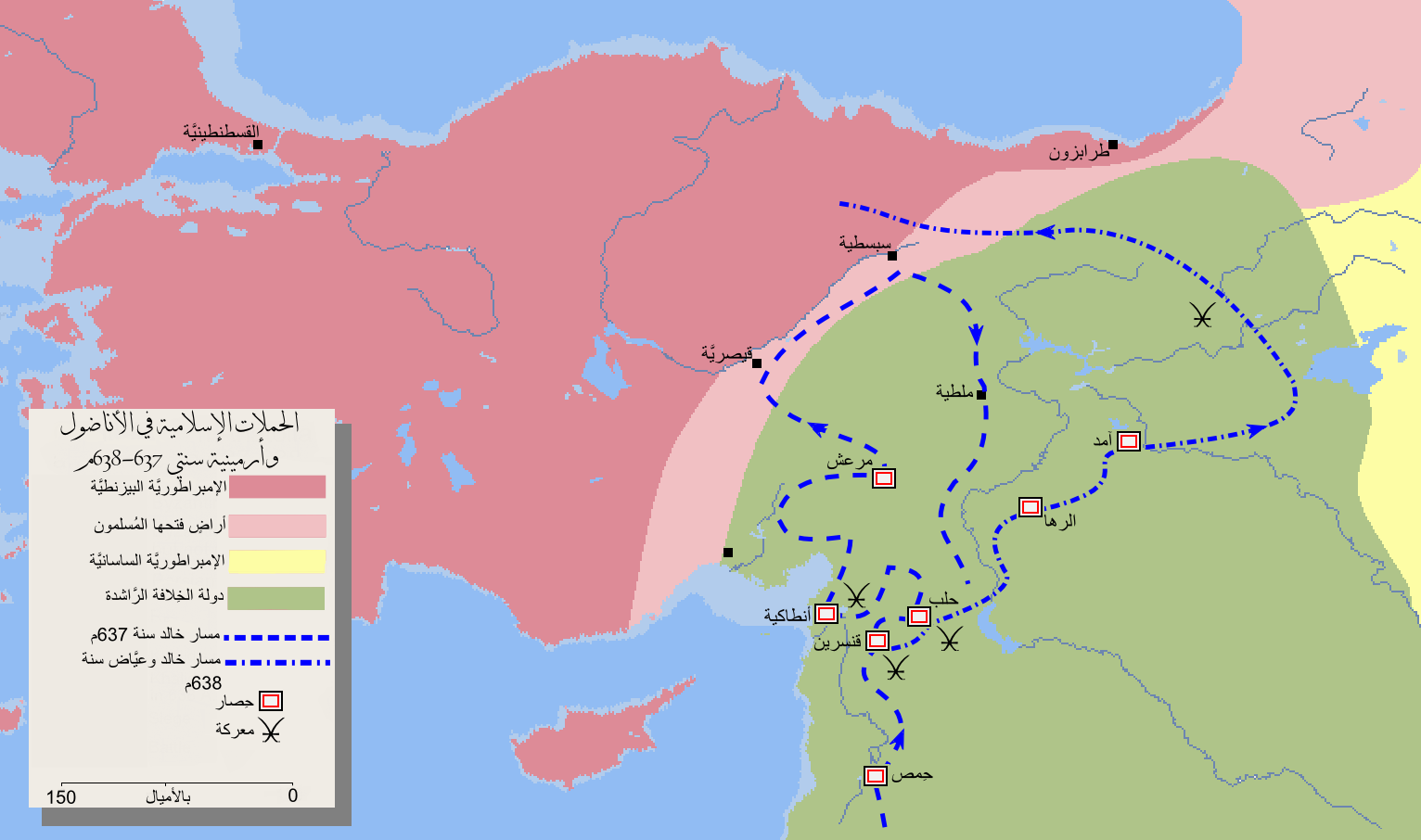 خارطة تُظهر الحملات الإسلاميَّة لِفتح الأناضول وأرمينية زمن الخِلافة الراشدة.